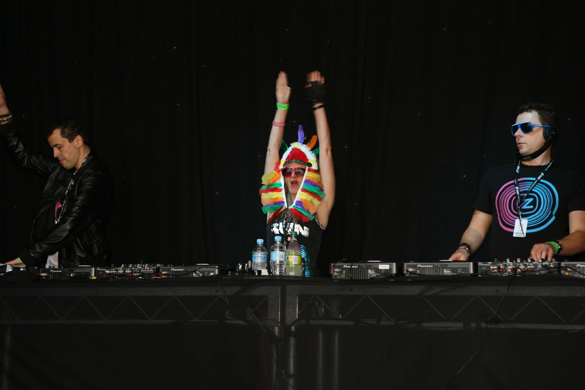 Vandalism